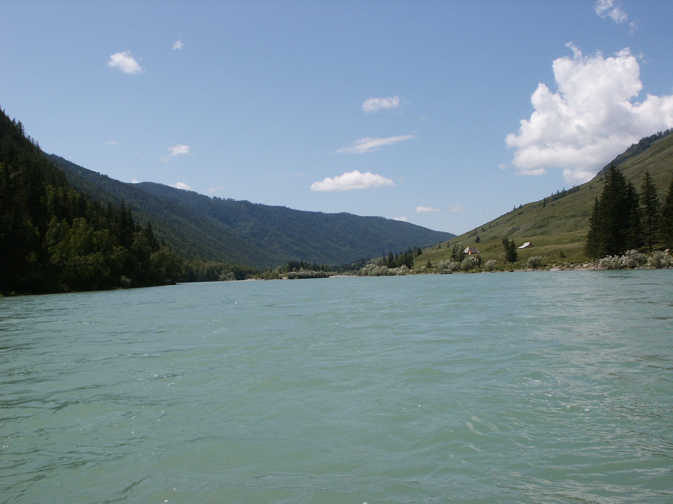 р. Катунь между Тюнгуром и р. Аккем